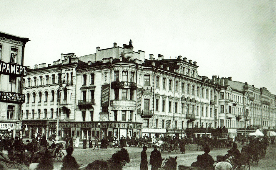 Casa Kutuzova, dove visse nel 1879-1880 Nikolaj Kletočnikov